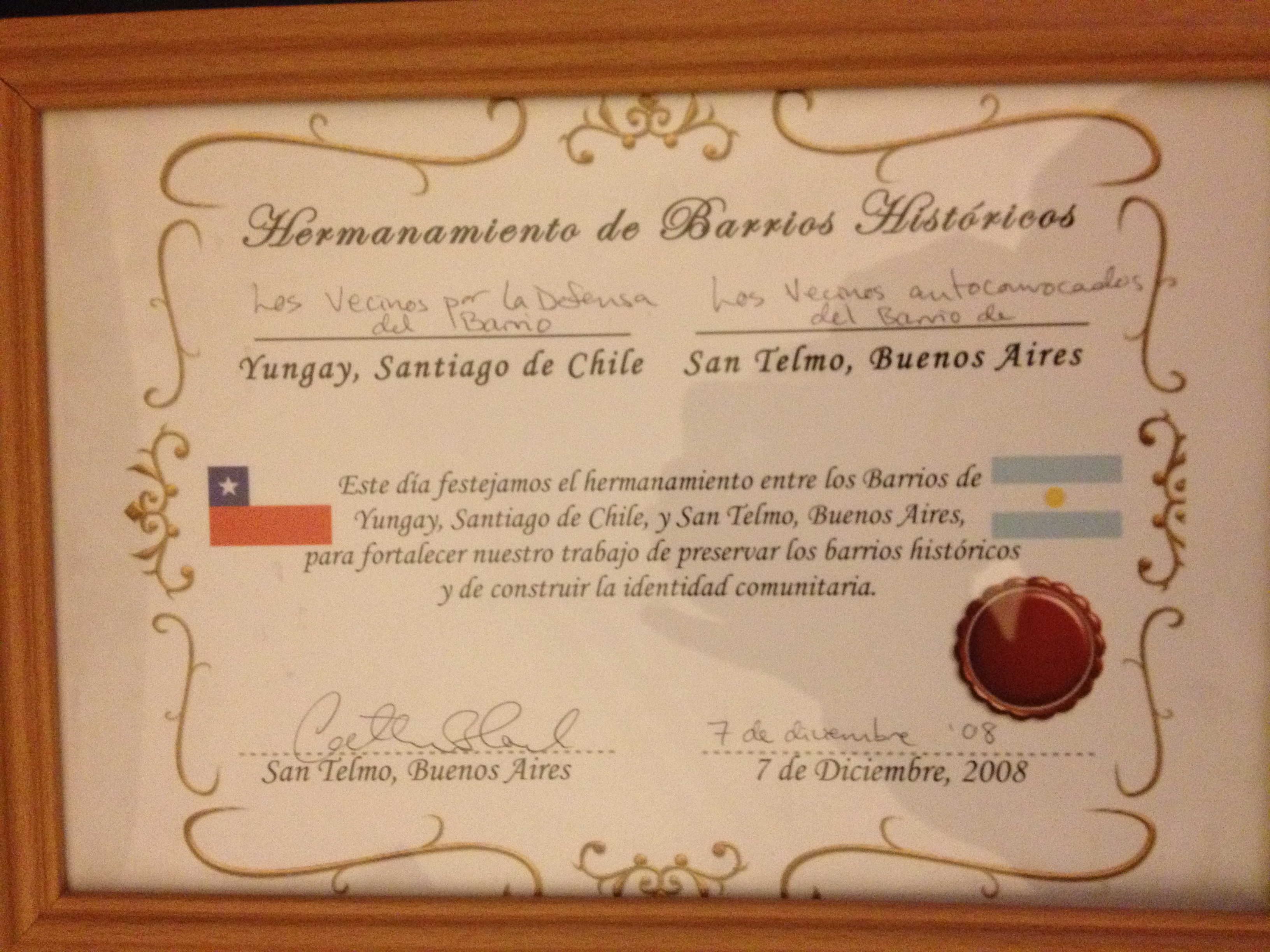 Diploma que acredita el hermanamiento de barrios históricos de Buenos Aires y Santiago de Chile.